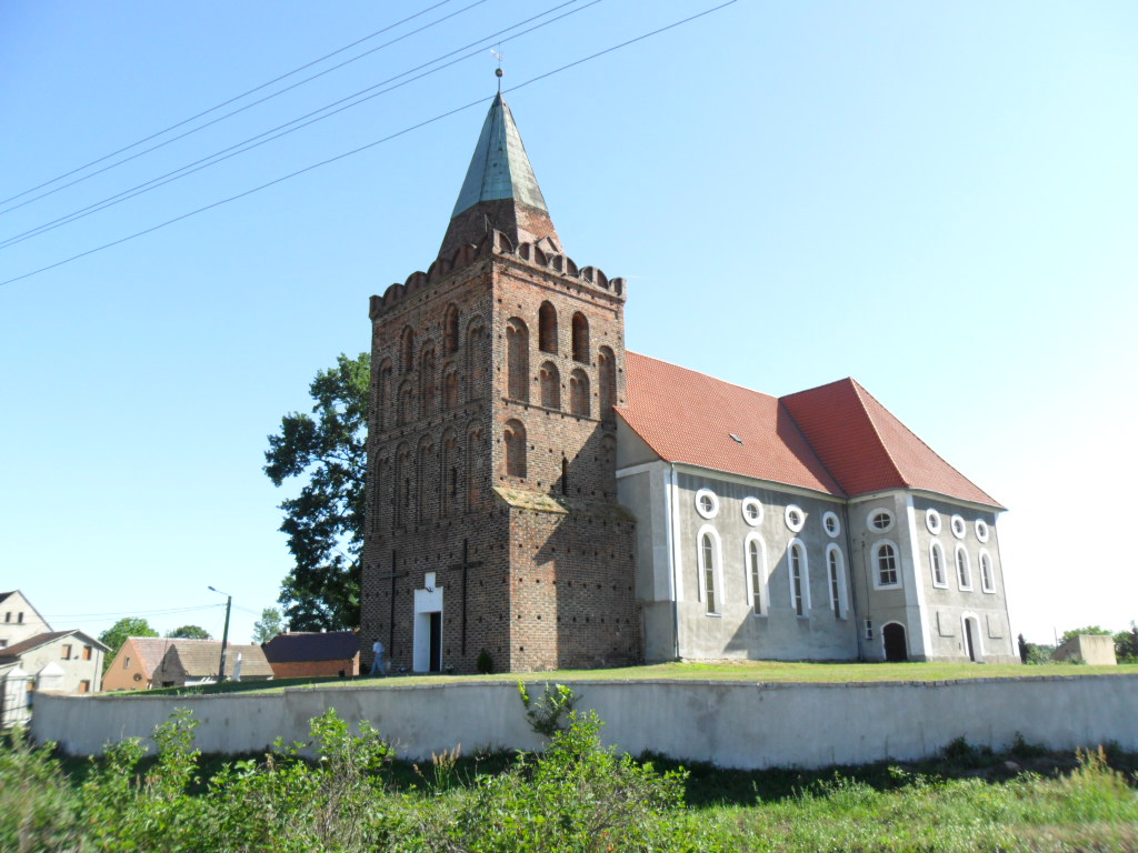 Kościół w Starosiedlu (zabytek nr rejestr. 286)